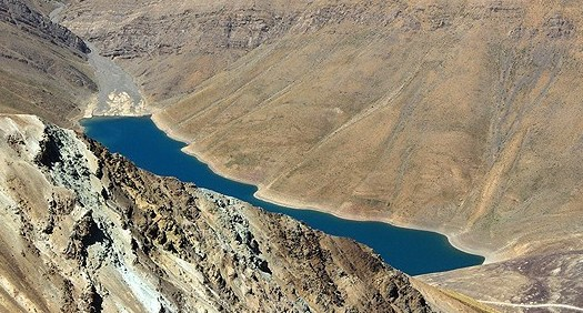 دریاچه تار از فراز زرینکوه